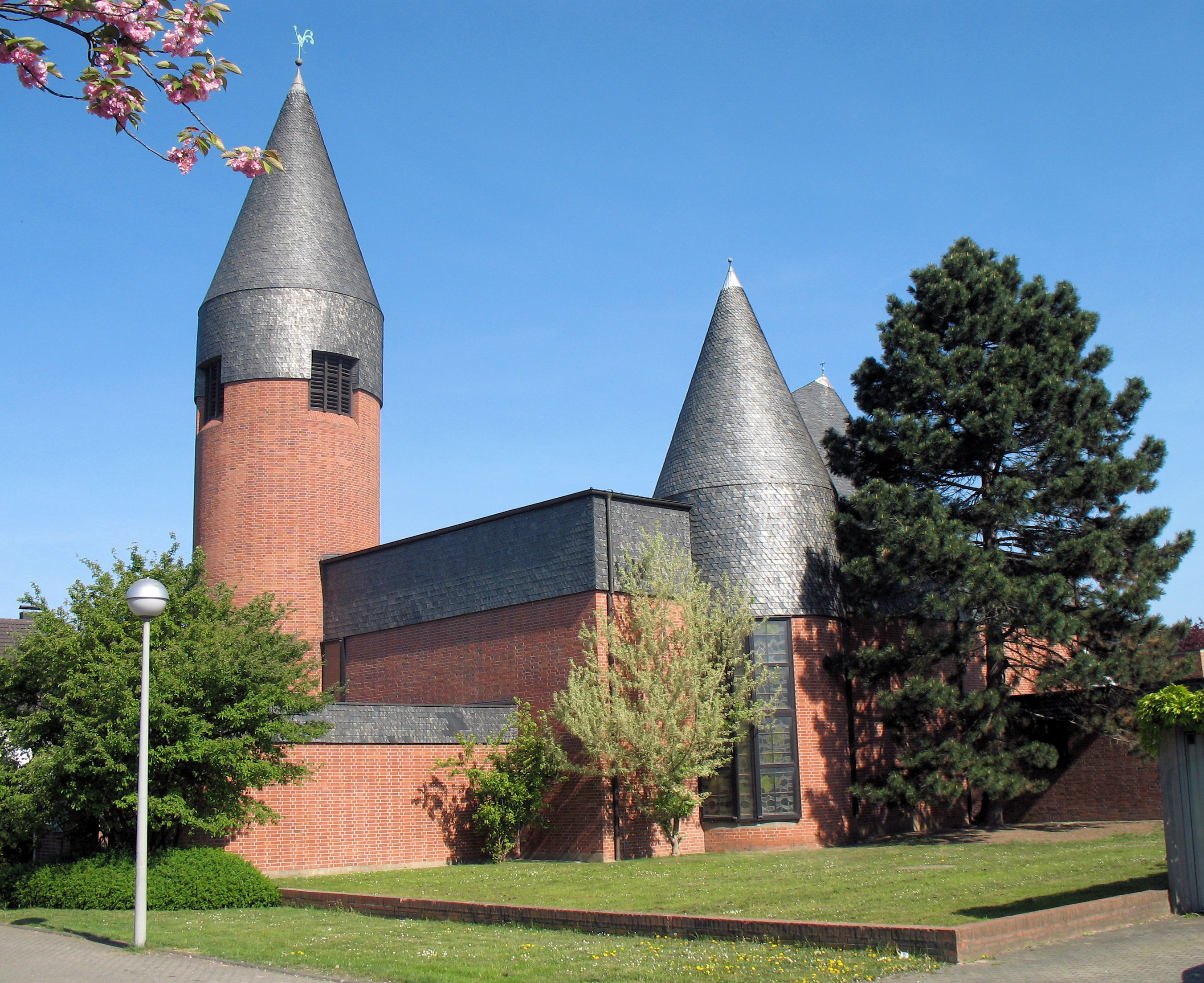 Pfarrkirche St. Adelheid in Troisdorf-Müllekoven